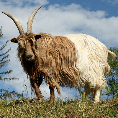 Kupferhalsziege - Projekt von ProSpecieRara